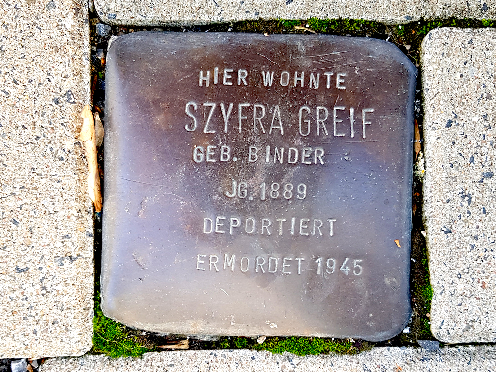 Stolperstein für Szyfra Greif, Jg. 1889, deportiert, ermordet 1945